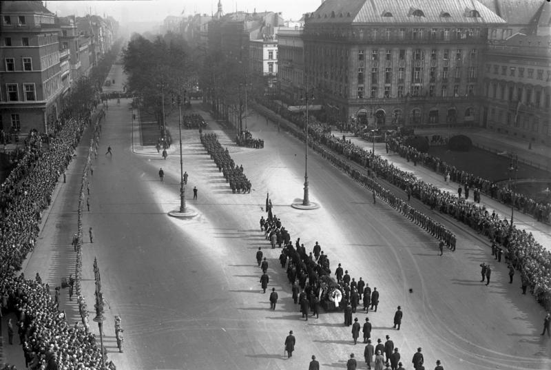 Die feierliche Beisetzung des deutschen Reichsaussenministers Dr. Stresemann in Berlin! Blick vom Brandenburger Tor auf den Pariser Platz während des Durchzuges des Trauerzuges.